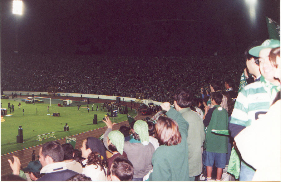 Antigo Estádio José Alvalade - Old Stadium José Alvalade